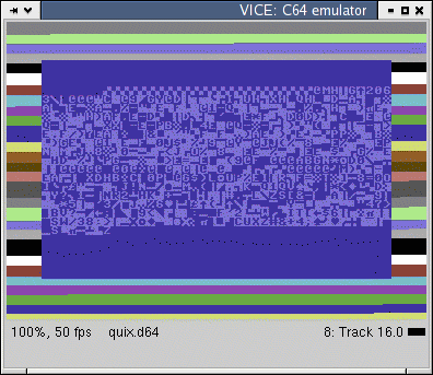 Modalità turbo di caricamento del C64. Schermata dall'emulatore VICE